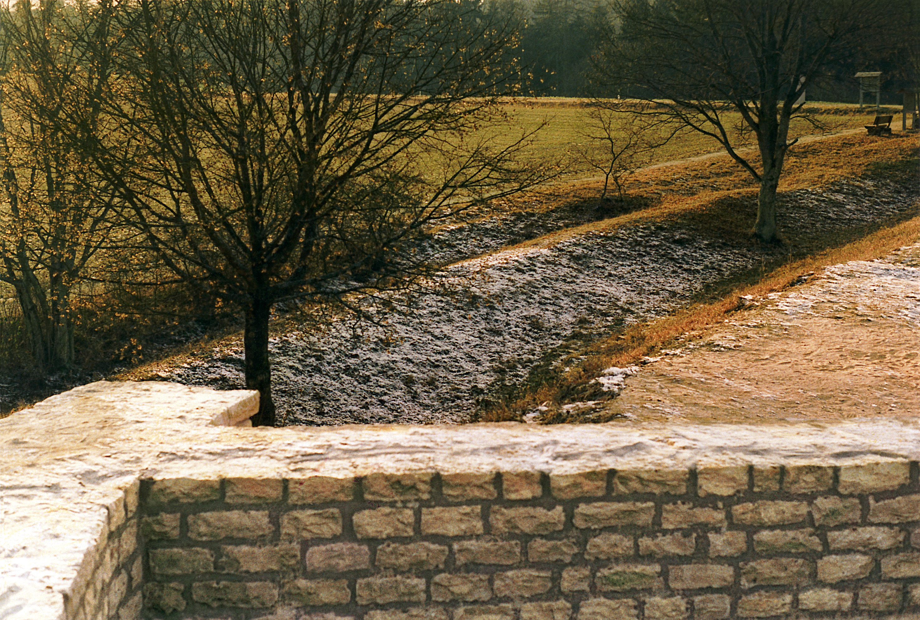 Der in den Felsen geschlagene Doppelspitzgraben des Kastells Pfünz (Castra Vetoniana) läßt sich an einem fast schneefreien Frühjahrsnachmittag besonders gut erkennen. Im Vordergrund die teilrekonstruierten Reste der Porta decumana. Zustand im Januar 1993.